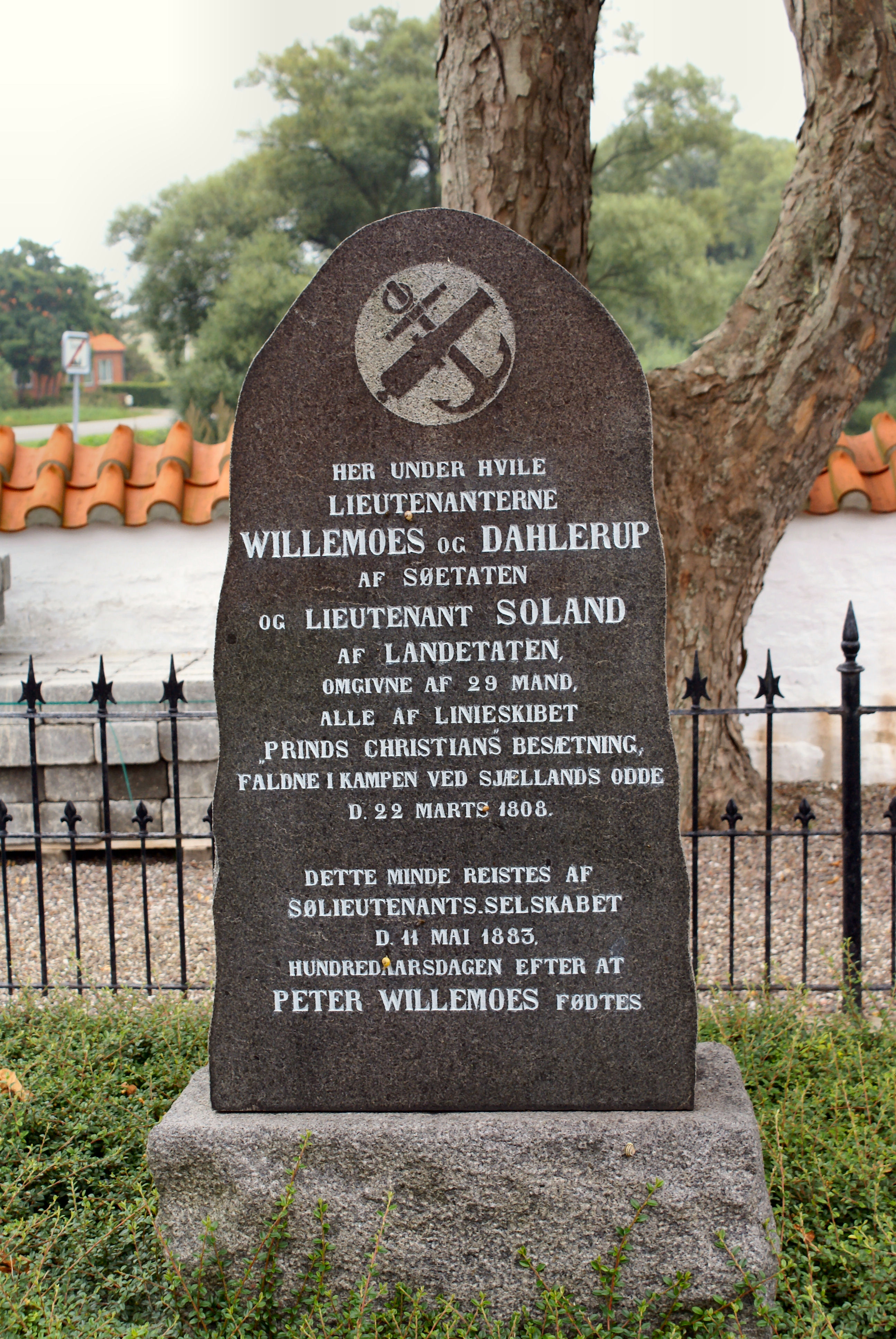 Odden Kirkegård, gravsted for de danske faldne under søslaget ved Sjællands Odde 1808, Sten for Peter Willemoes m.fl.